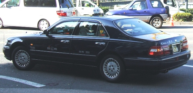 Kokusai Motorcars Premium taxi.